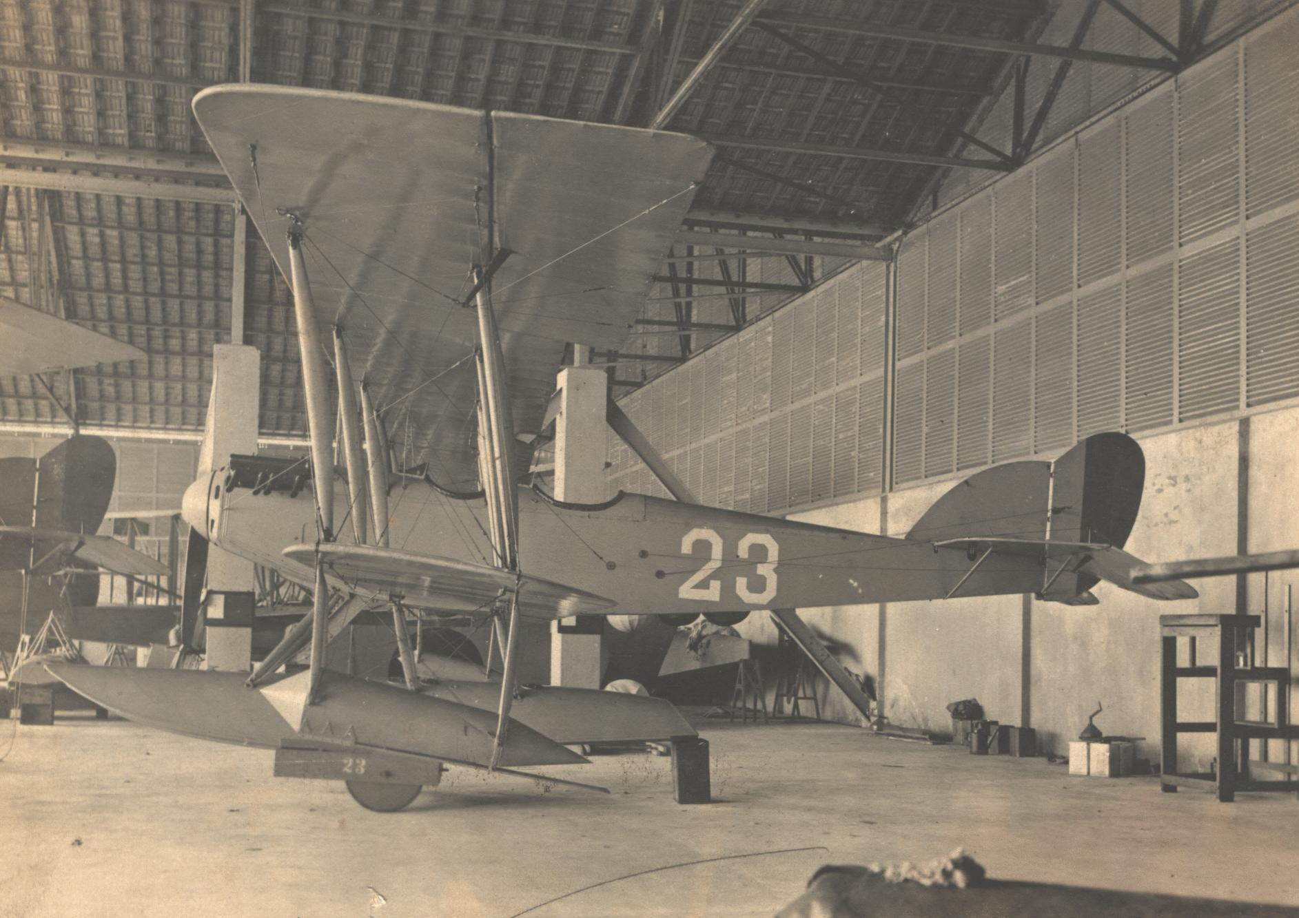 Arquivo liberado pela Marinha do Brasil através de projeto GLAM com Wiki Educação Brasil